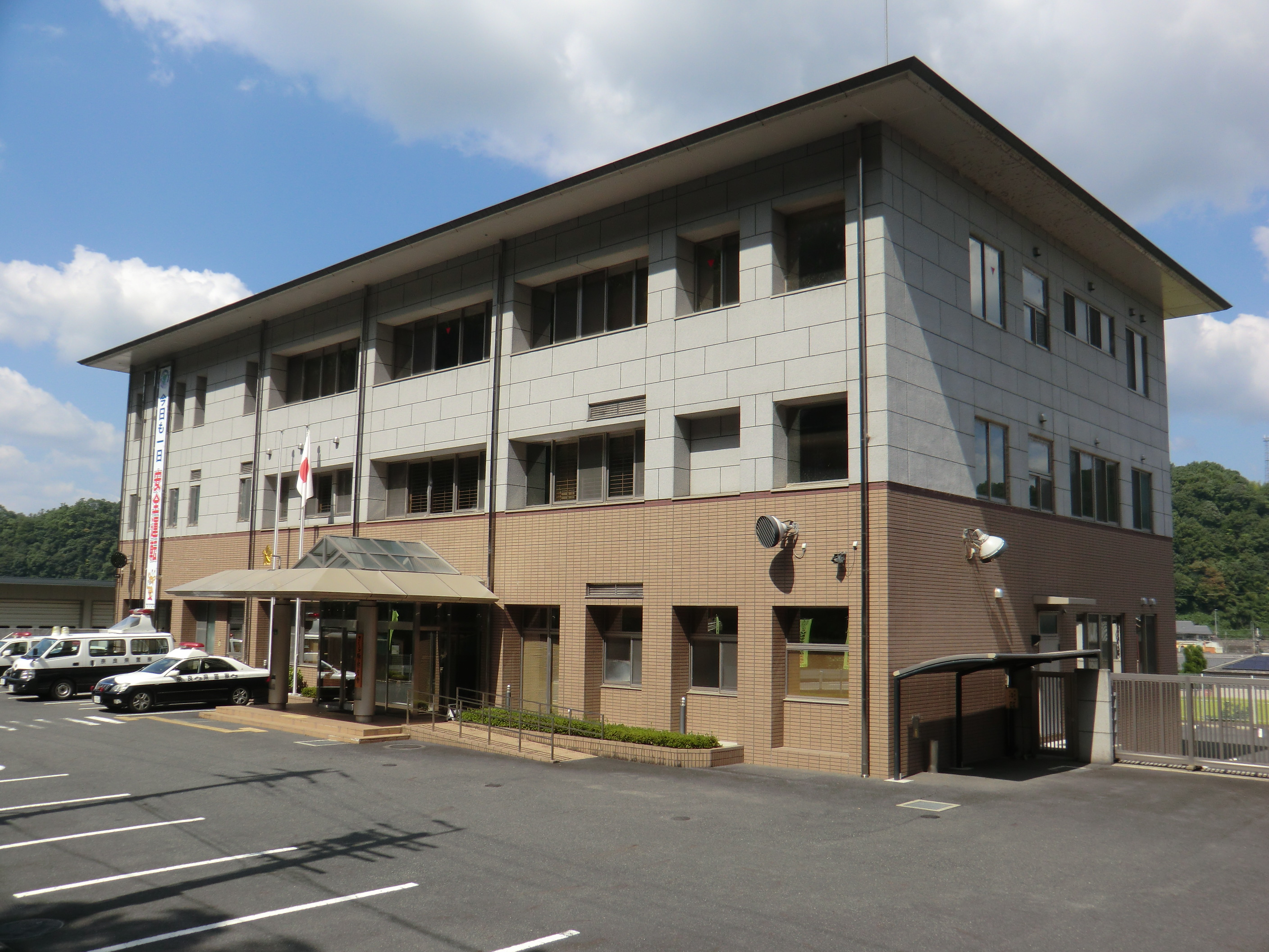 吉野警察署さくら警察庁舎、2014年。